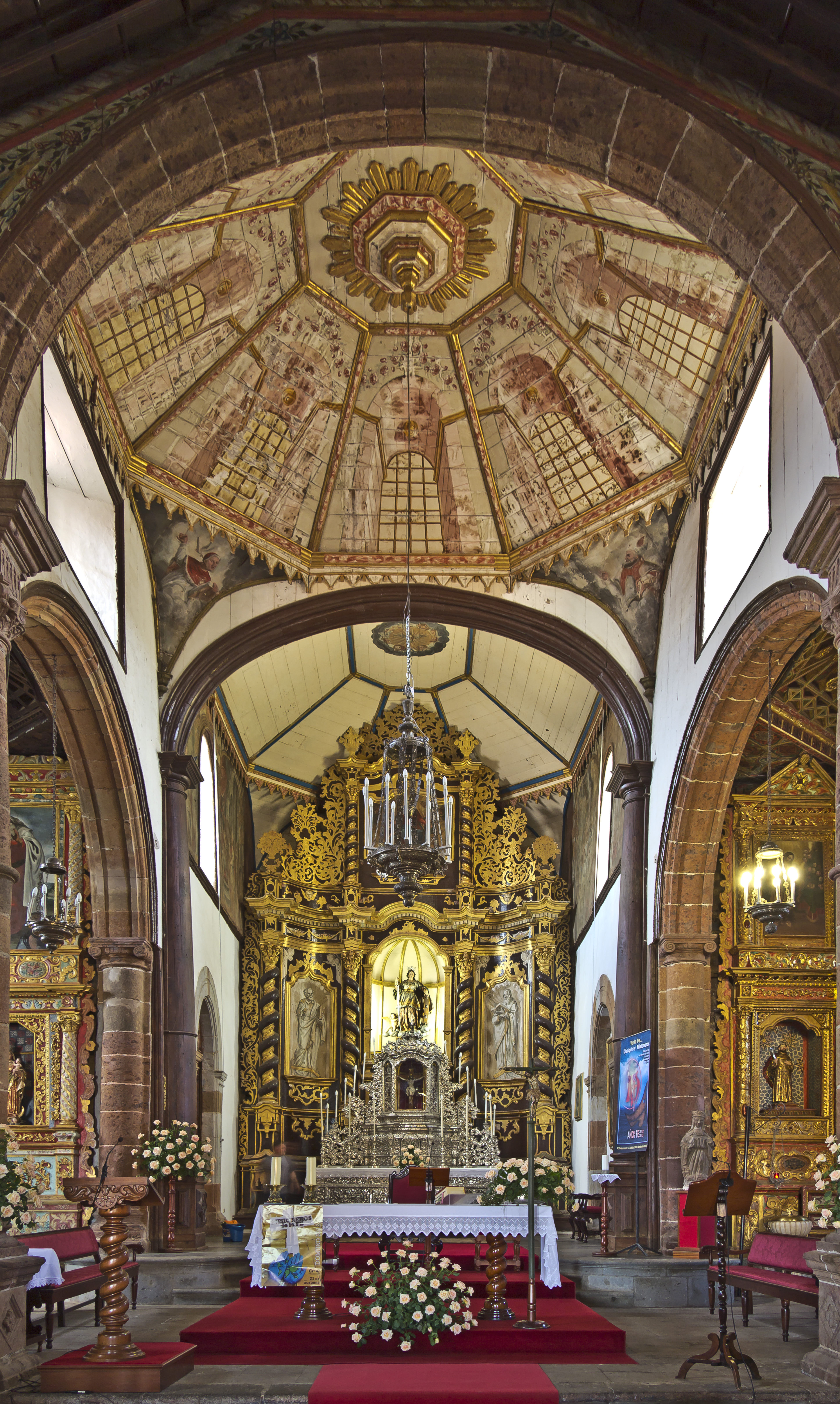 Vierung und Hauptaltar der Kirche Santa Catalina in Tacoronte